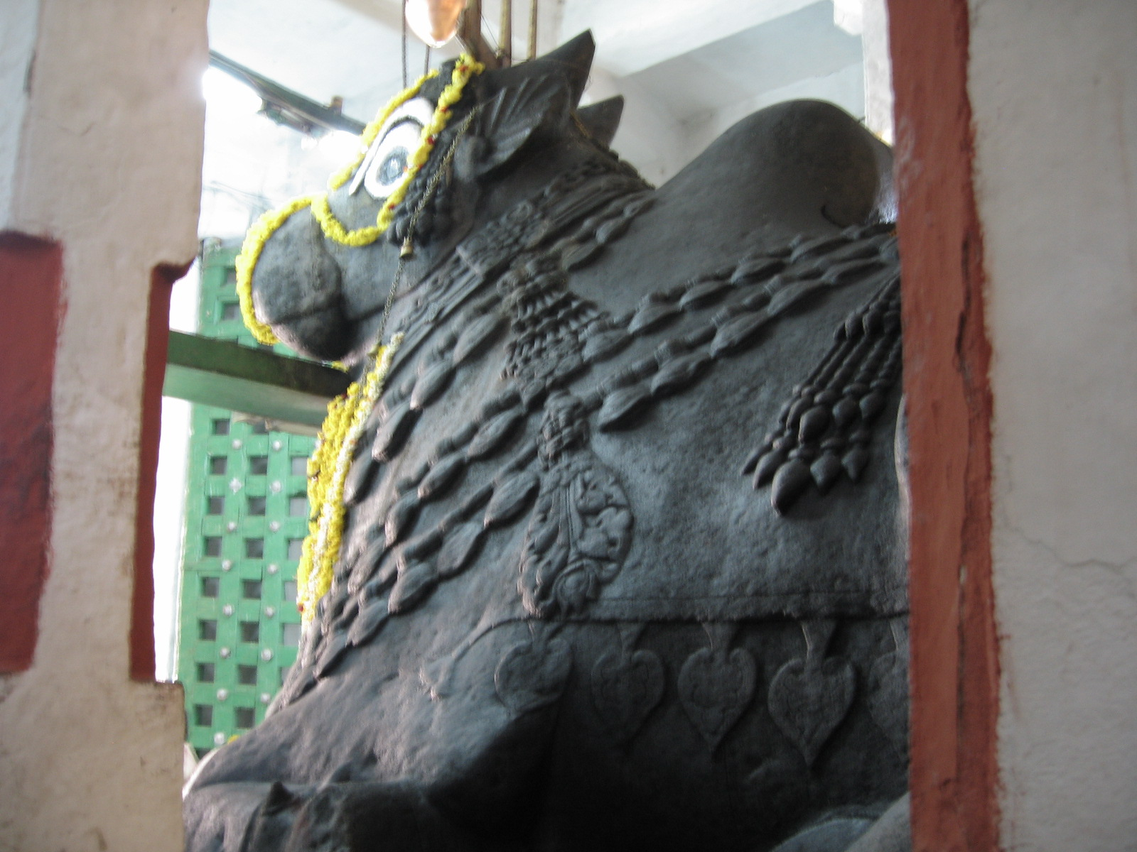 Nandi at Bull Temple, Bengalooru.